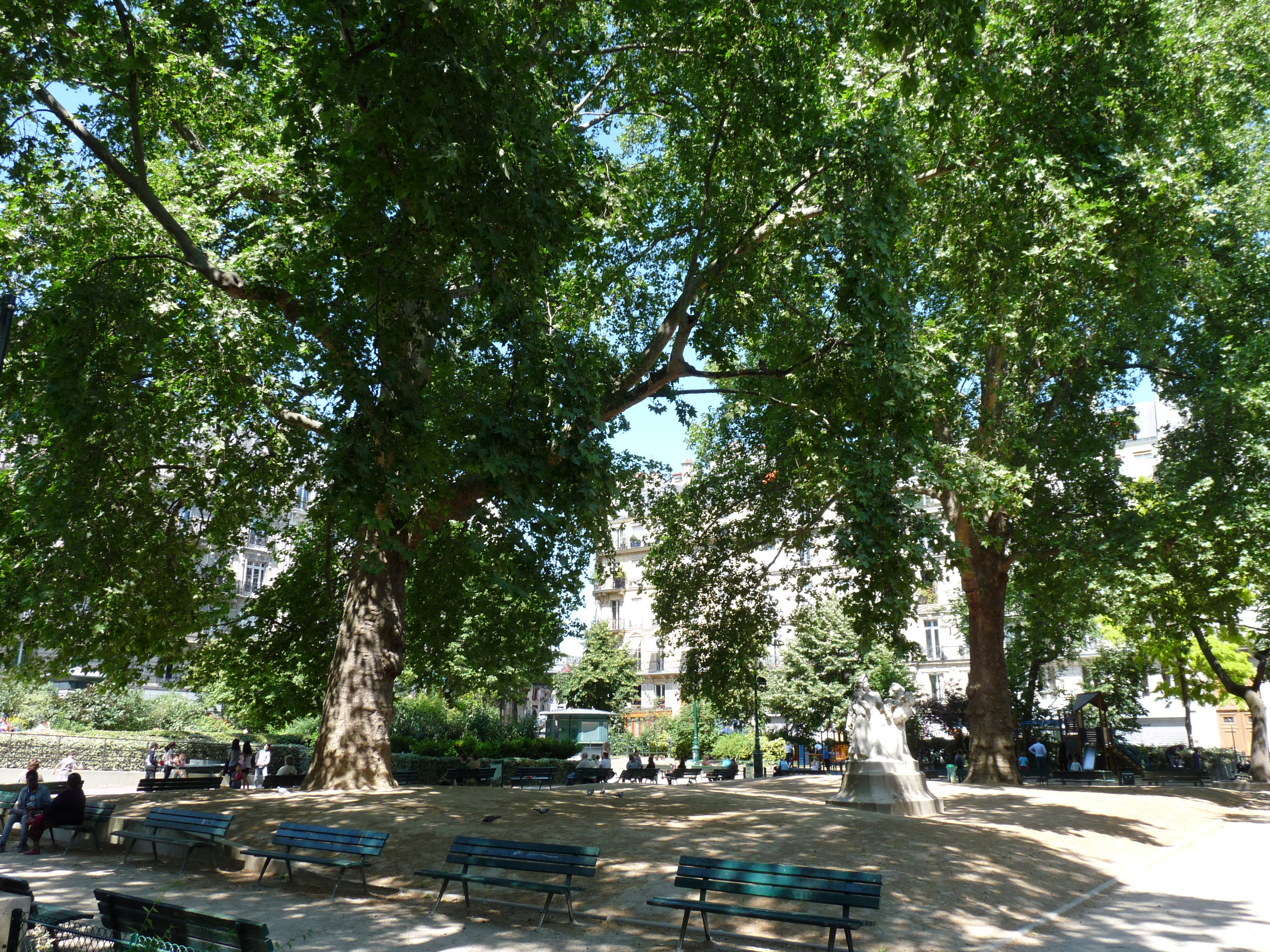 Le square Montholon à Paris